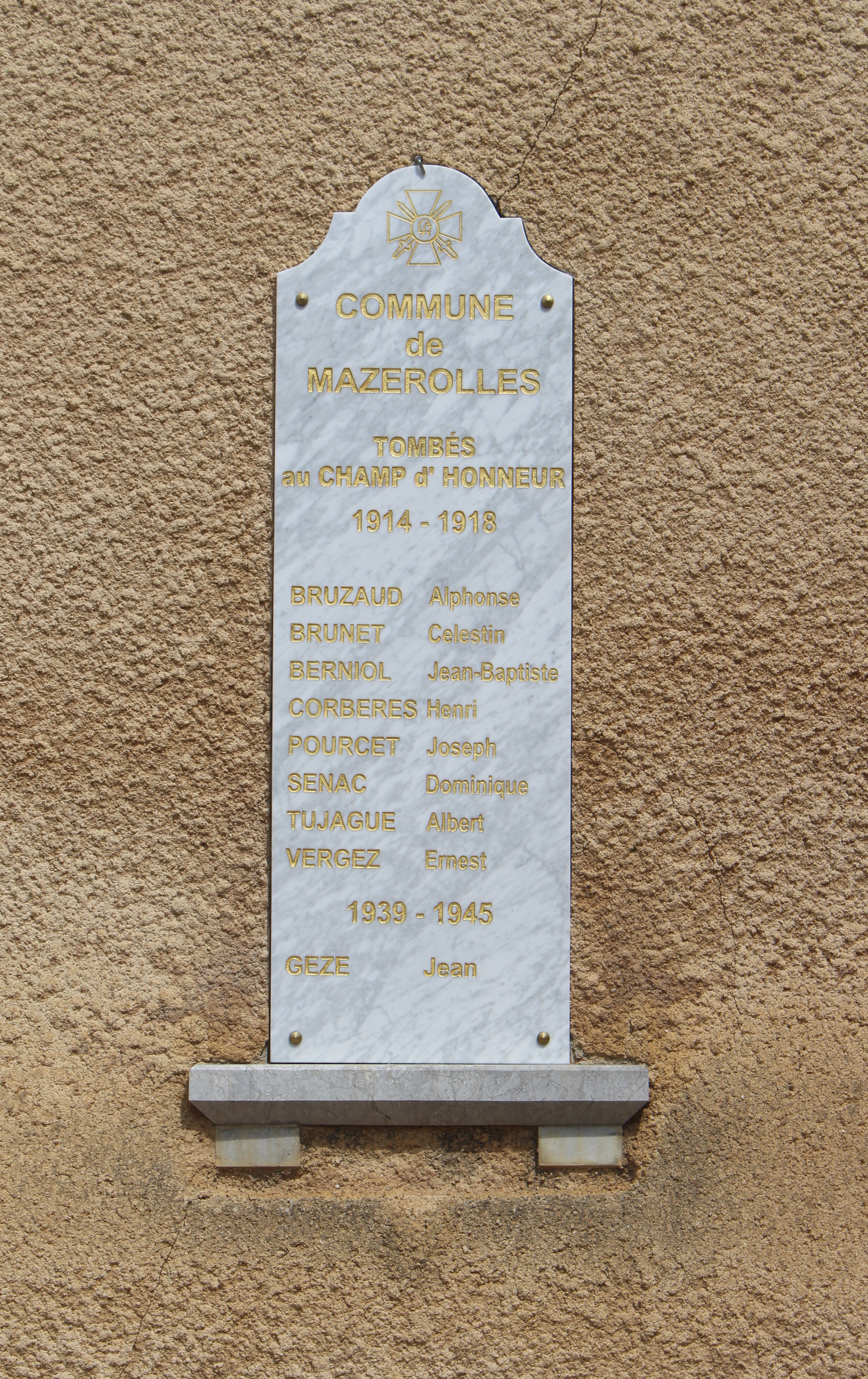 Monument aux morts de Mazerolles (Hautes-Pyrénées)